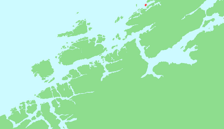 Locator map of Lauvøya, Sør-Trøndelag, Norway